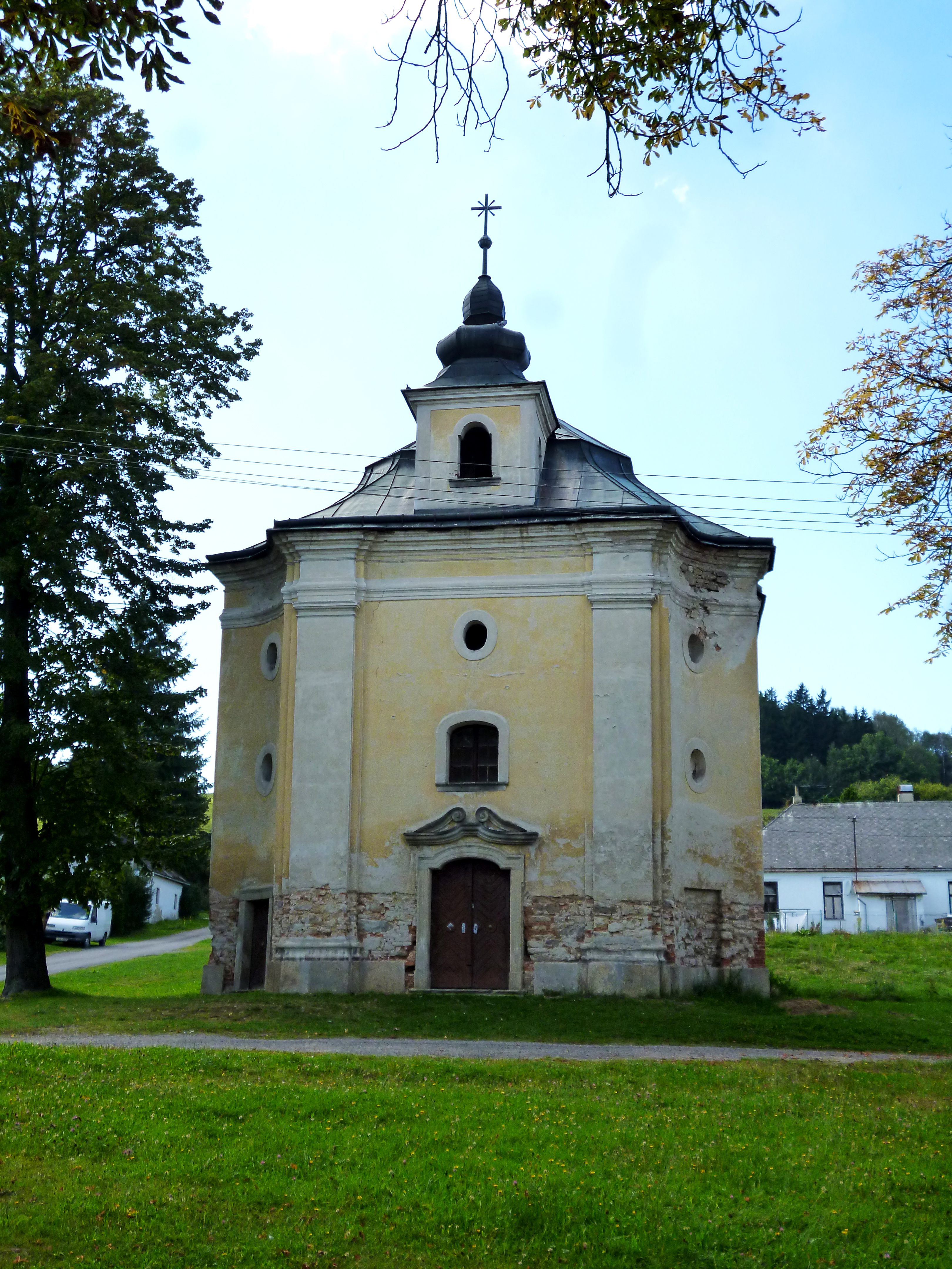 Mirošov - Kostel sv. Josefa